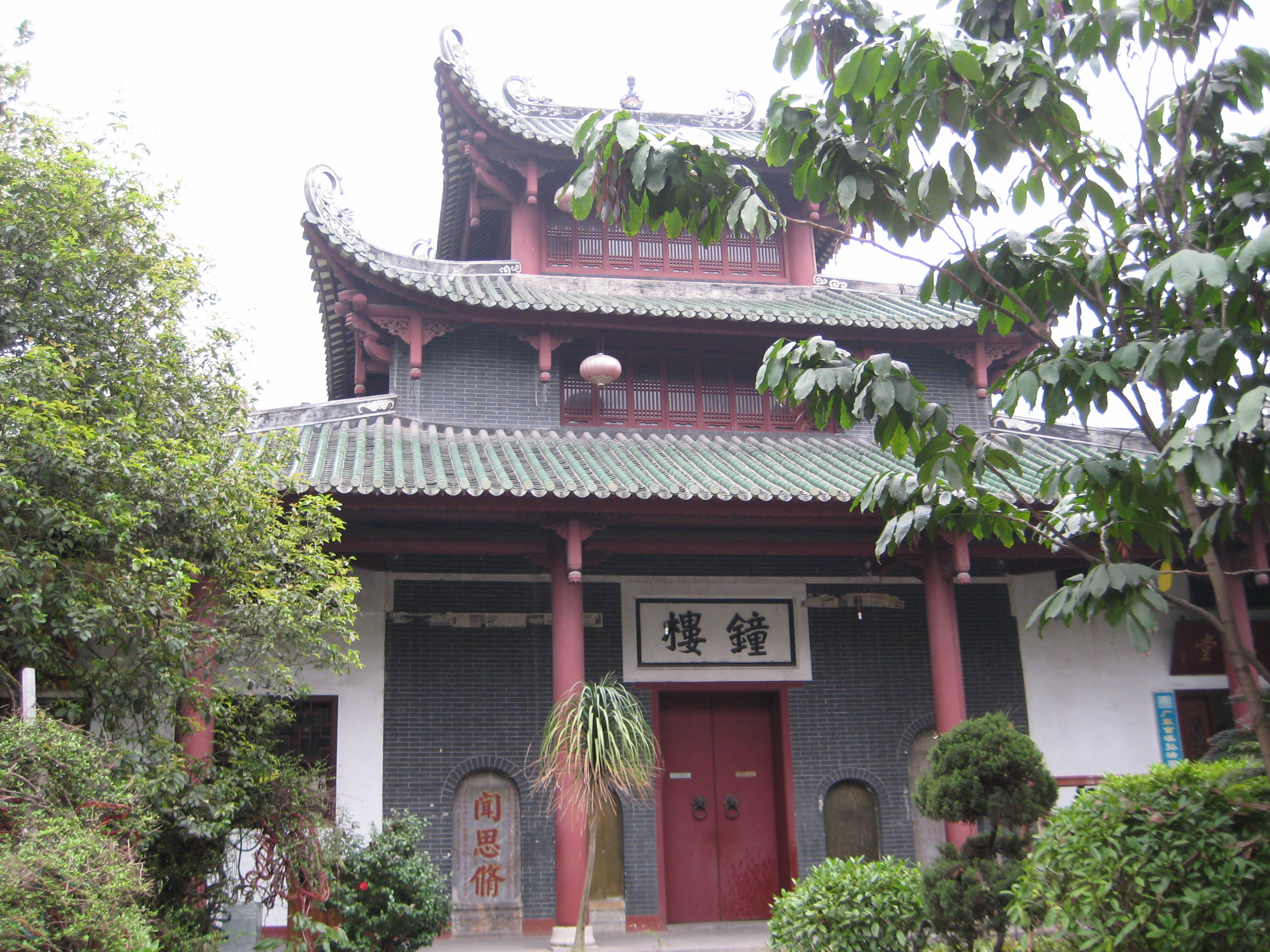 南华寺钟楼.JPG